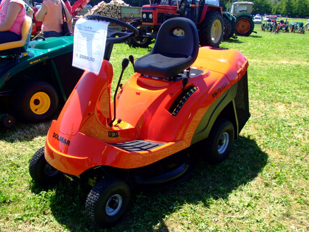 Dolmar-Aufsitzrasenmäher RM-72.13 H